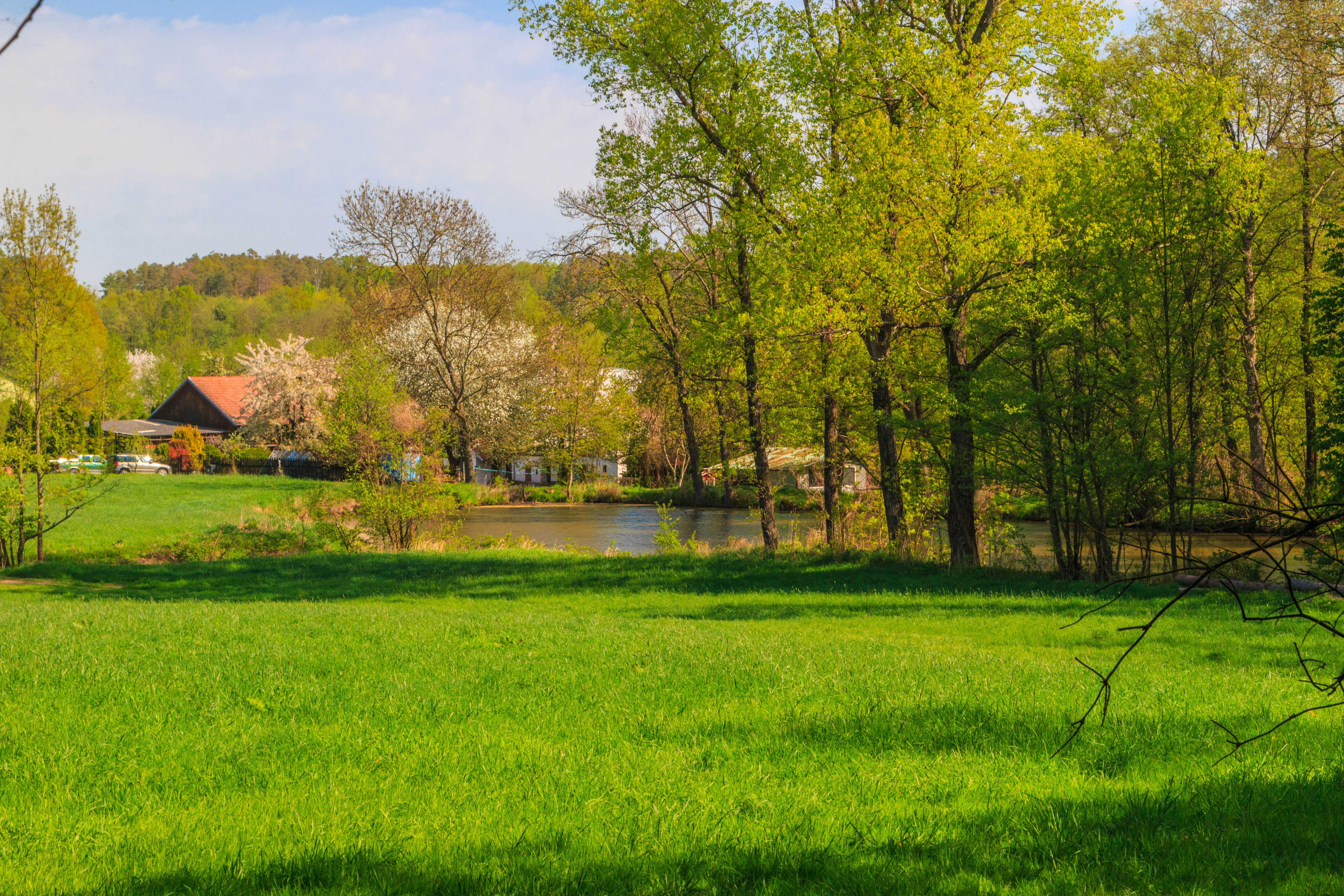 Rybník Rohlíček v osadě Ledec Project: Vodstvo.